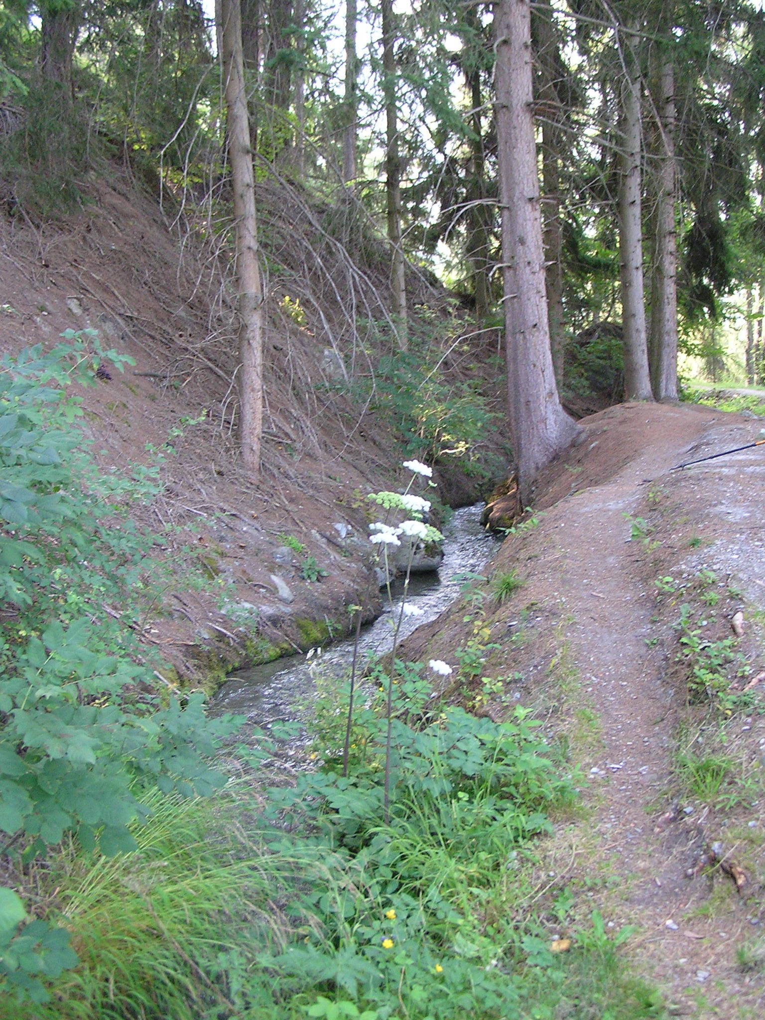 Le bisse de Salins, entre Salins et Veysonnaz.